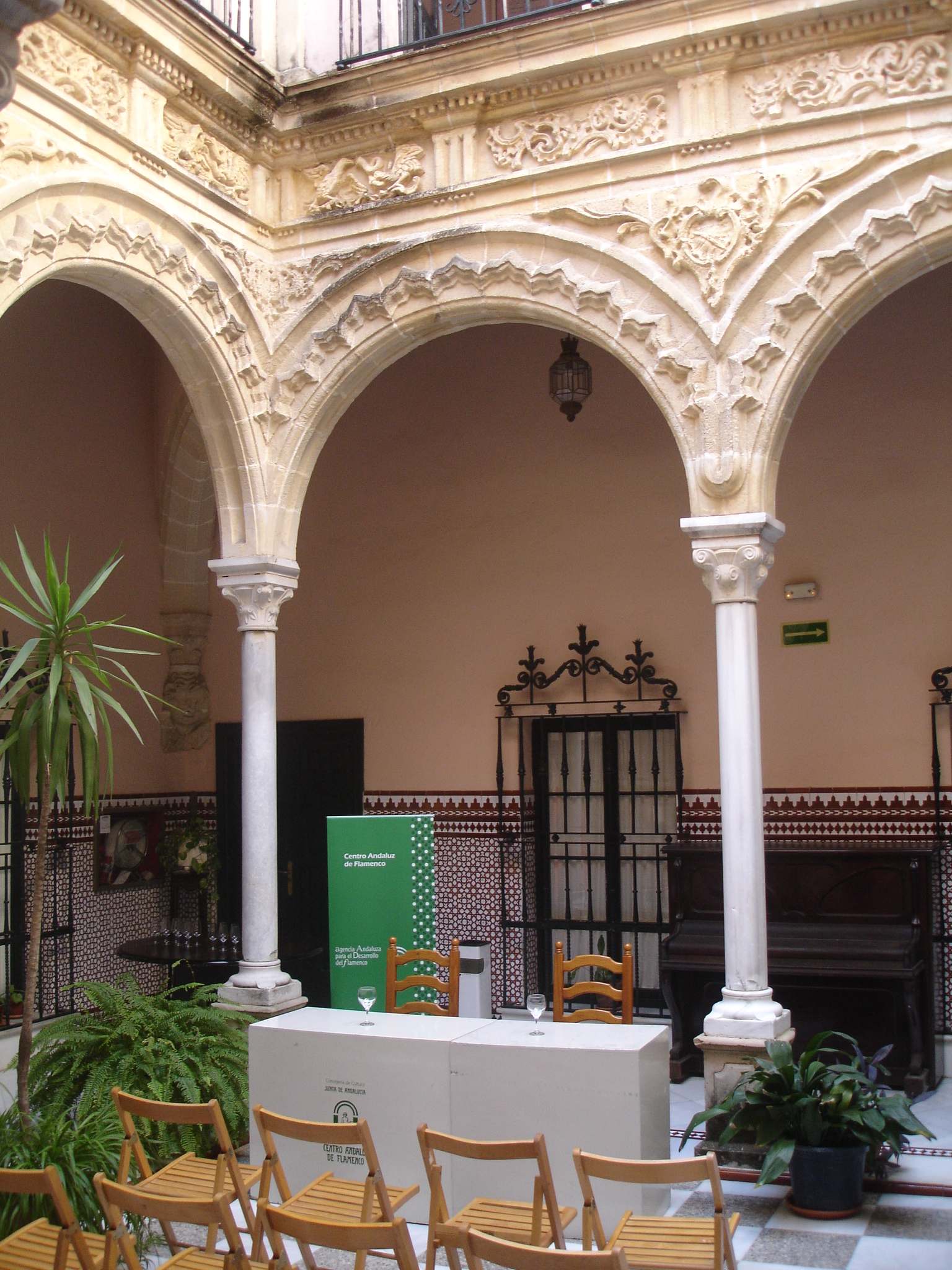 Pemartín Palace, Jerez de la Frontera, Andalusia (Spain) Pemartiín Palace, Jerez de la Frontera